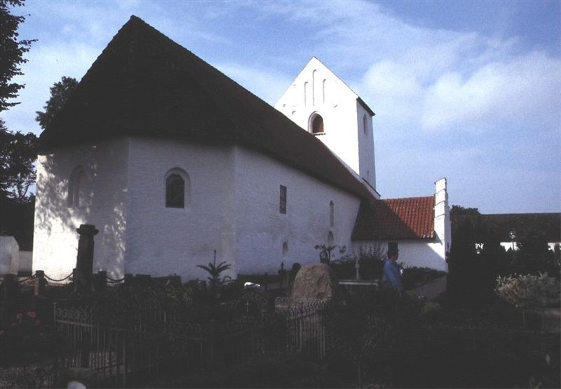 Sebber Kirke i Danmark. Sebber kirke